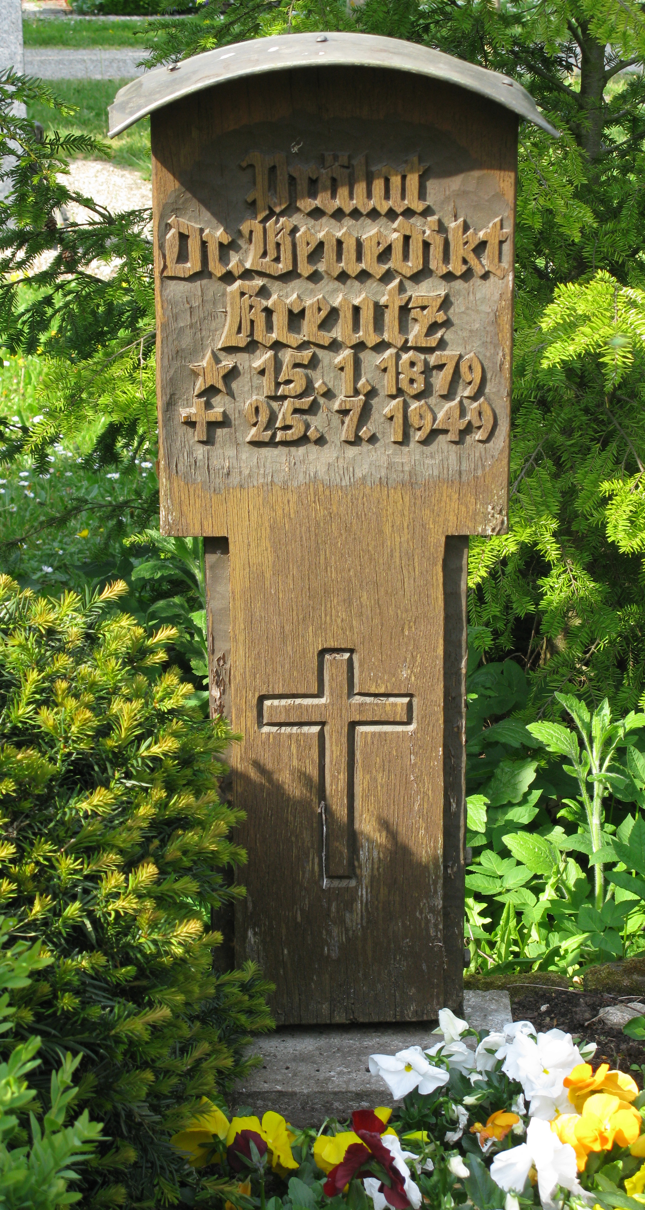 Kreutz, Benedikt, Prälat